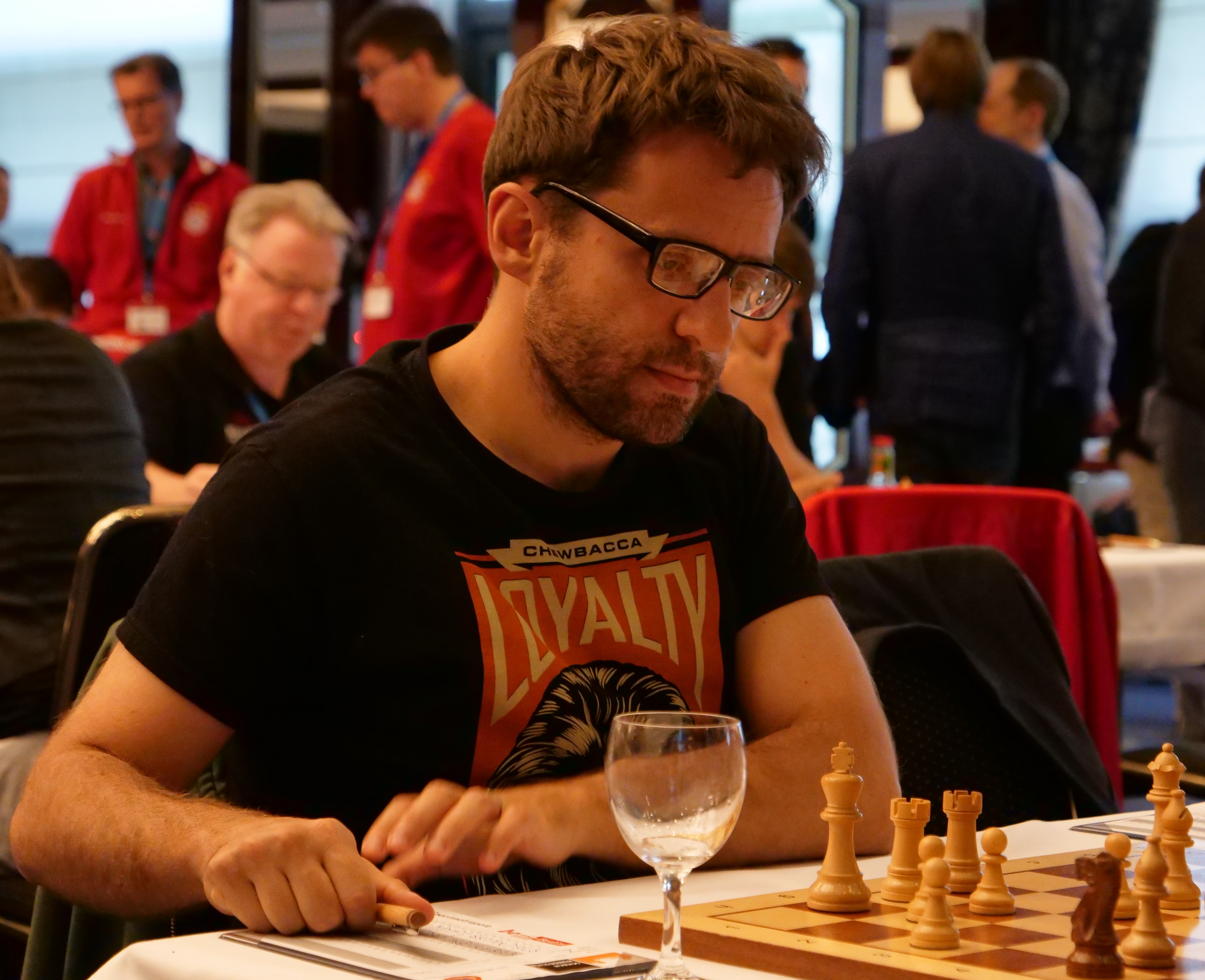 Aronjan in der Bundesliga-Endrunde 30-4-2018